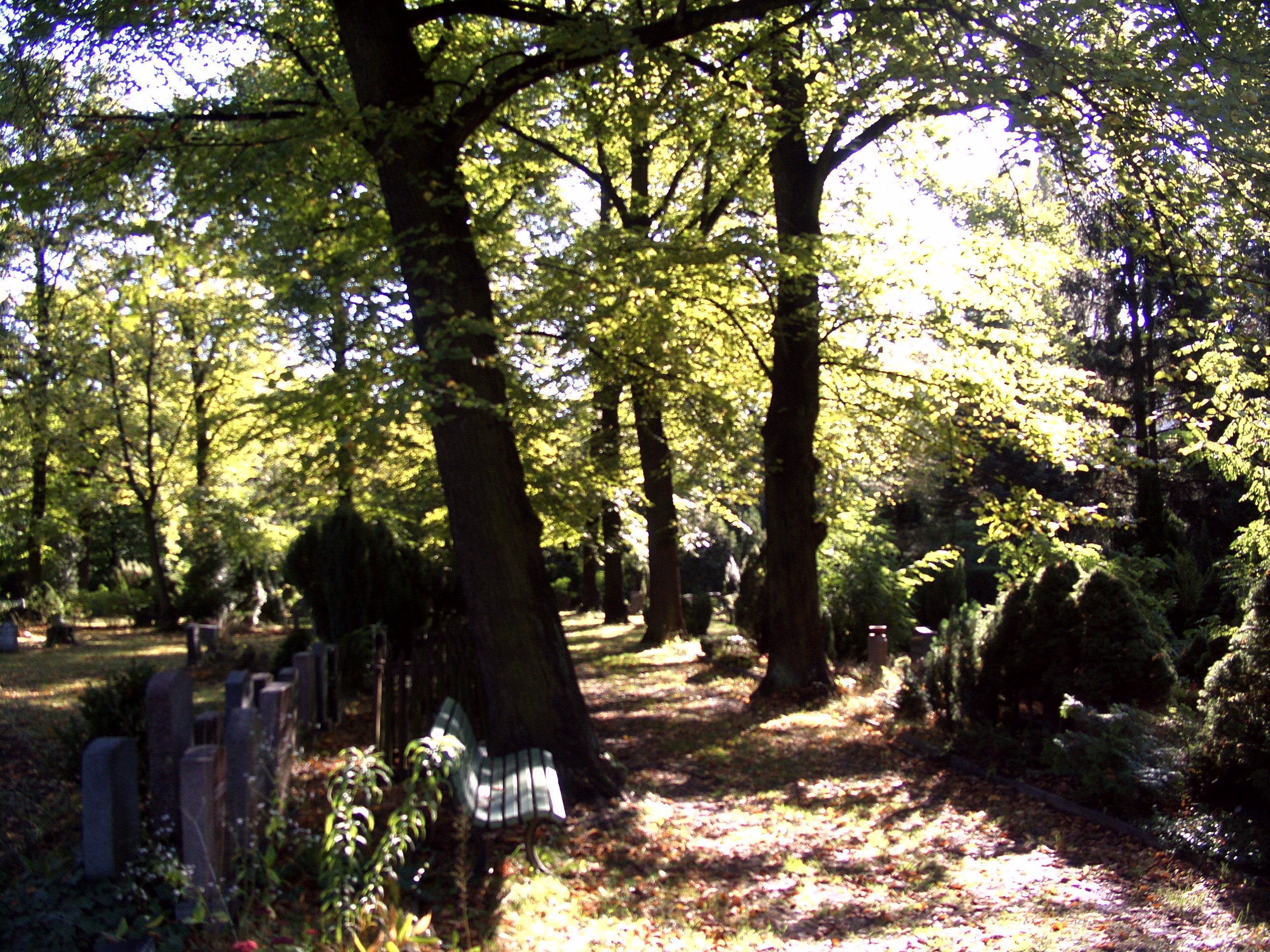 Der stillgelegte landeseigene Friedhof Pankow II an der Gaillardstraße in Berlin-Pankow. Angelegt als Zweiter Städtischer Friedhof in der Landgemeinde (Vorort) Pankow.